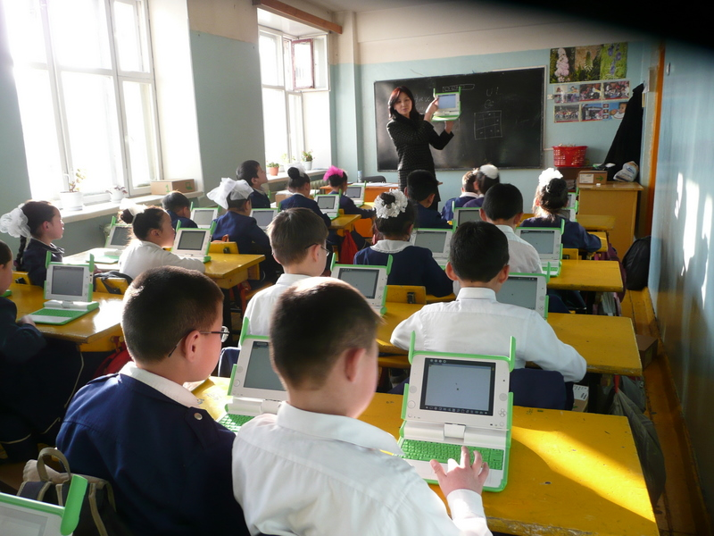 OLPC Class - Mongolia Ulaanbaatar